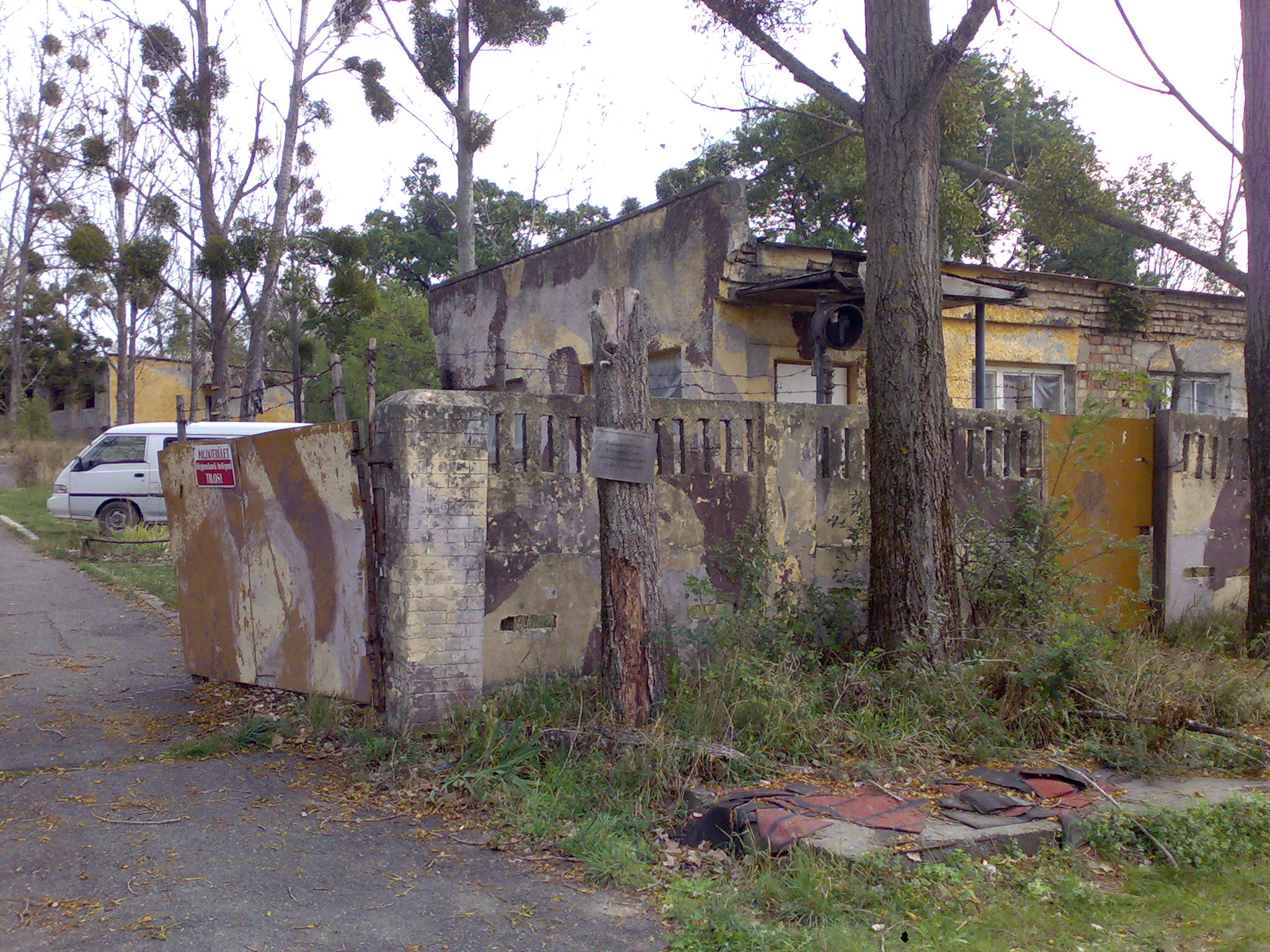 Nagyteveli bázis